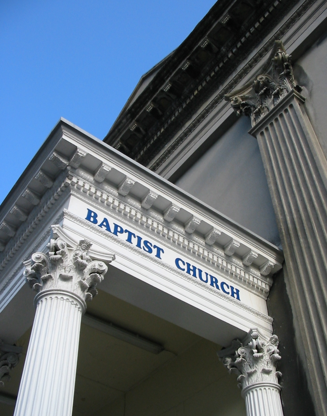 Nrf: Saint Hélyi, Jèrri